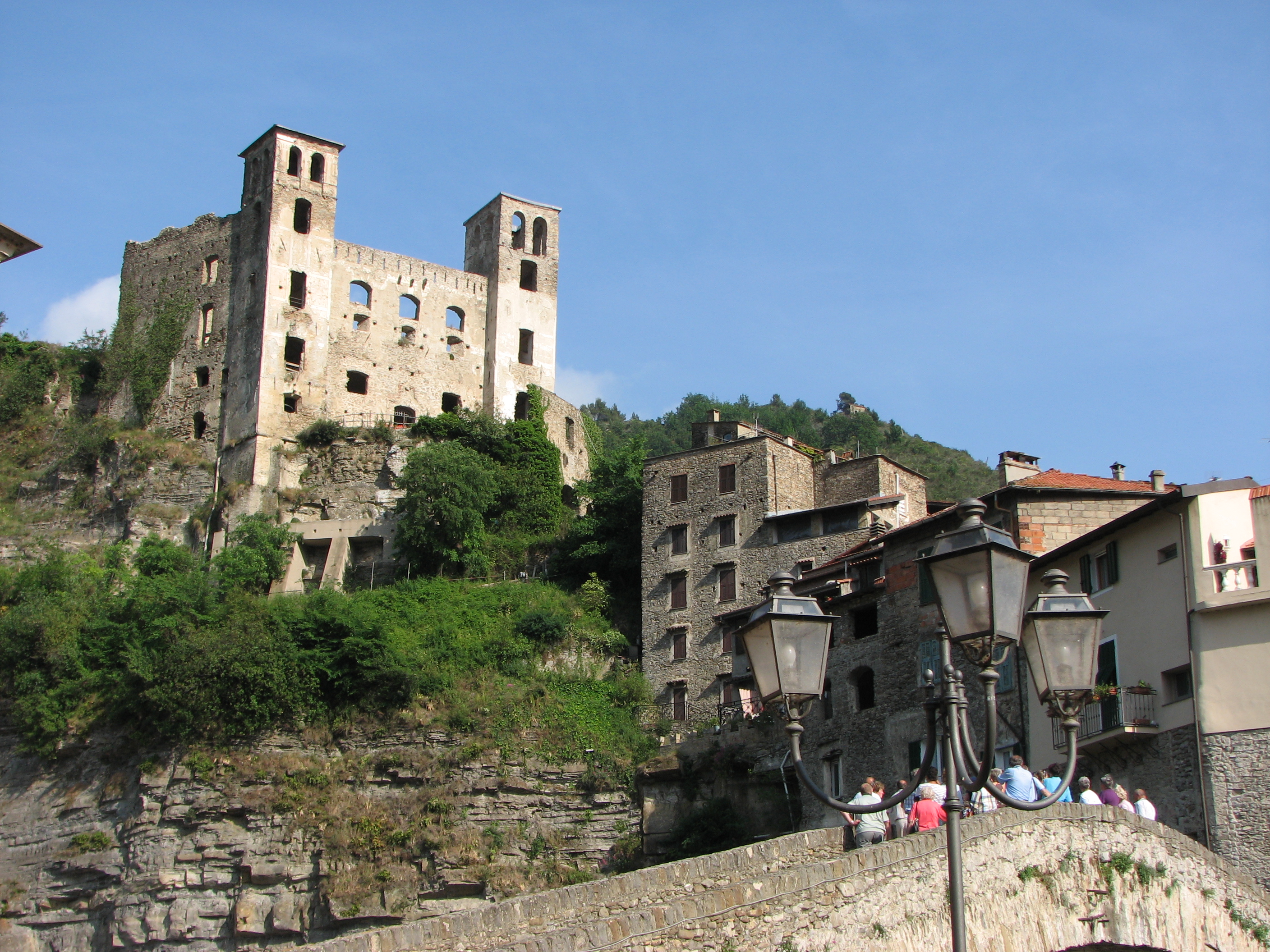 Vista del castello e del ponte medievale.